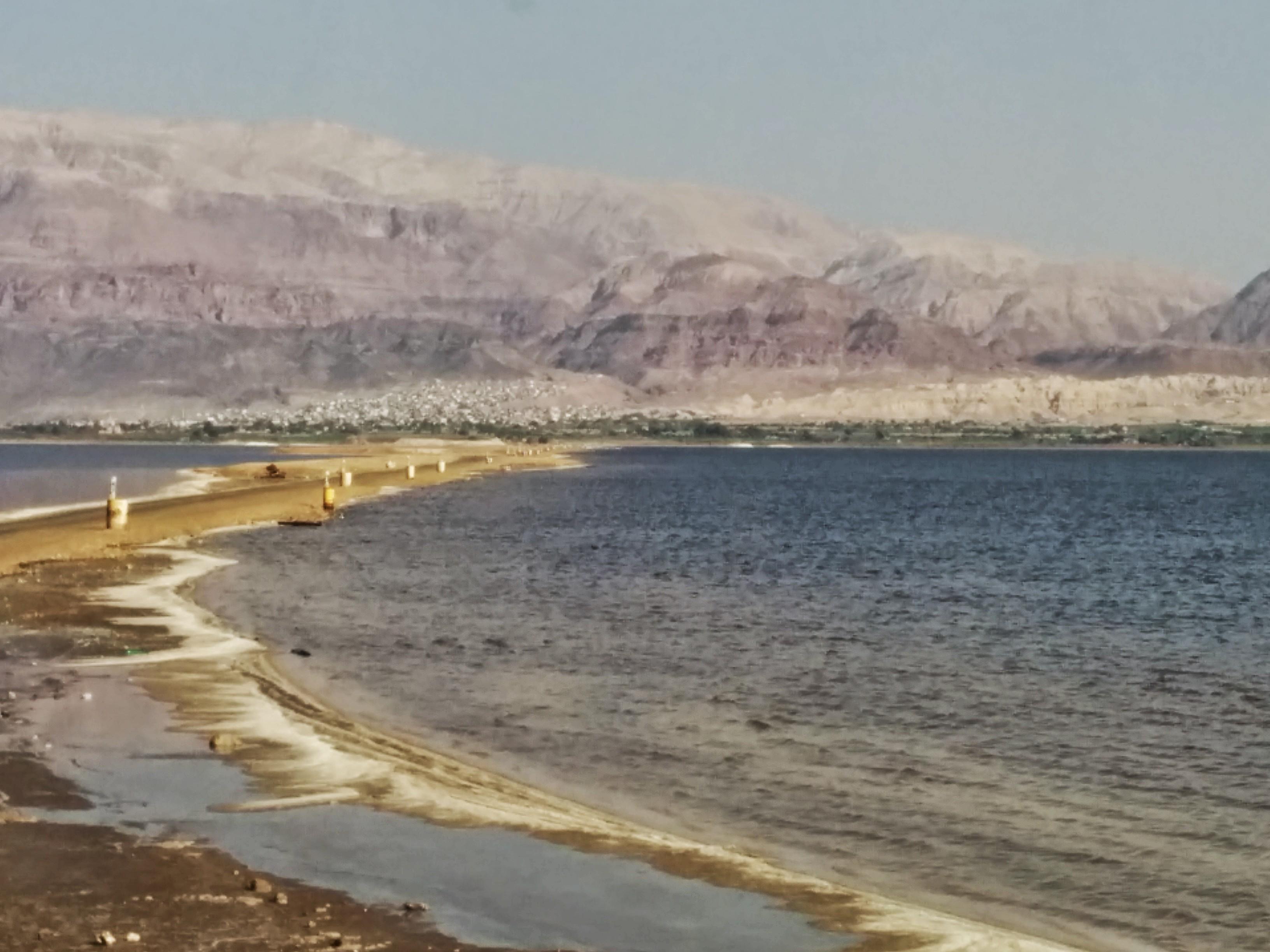 The Dead Sea Works is an Israeli potash plant in Sdom, on the Dead Sea coast of Israel - unit of ICL Fertilizers מפעלי ים המלח